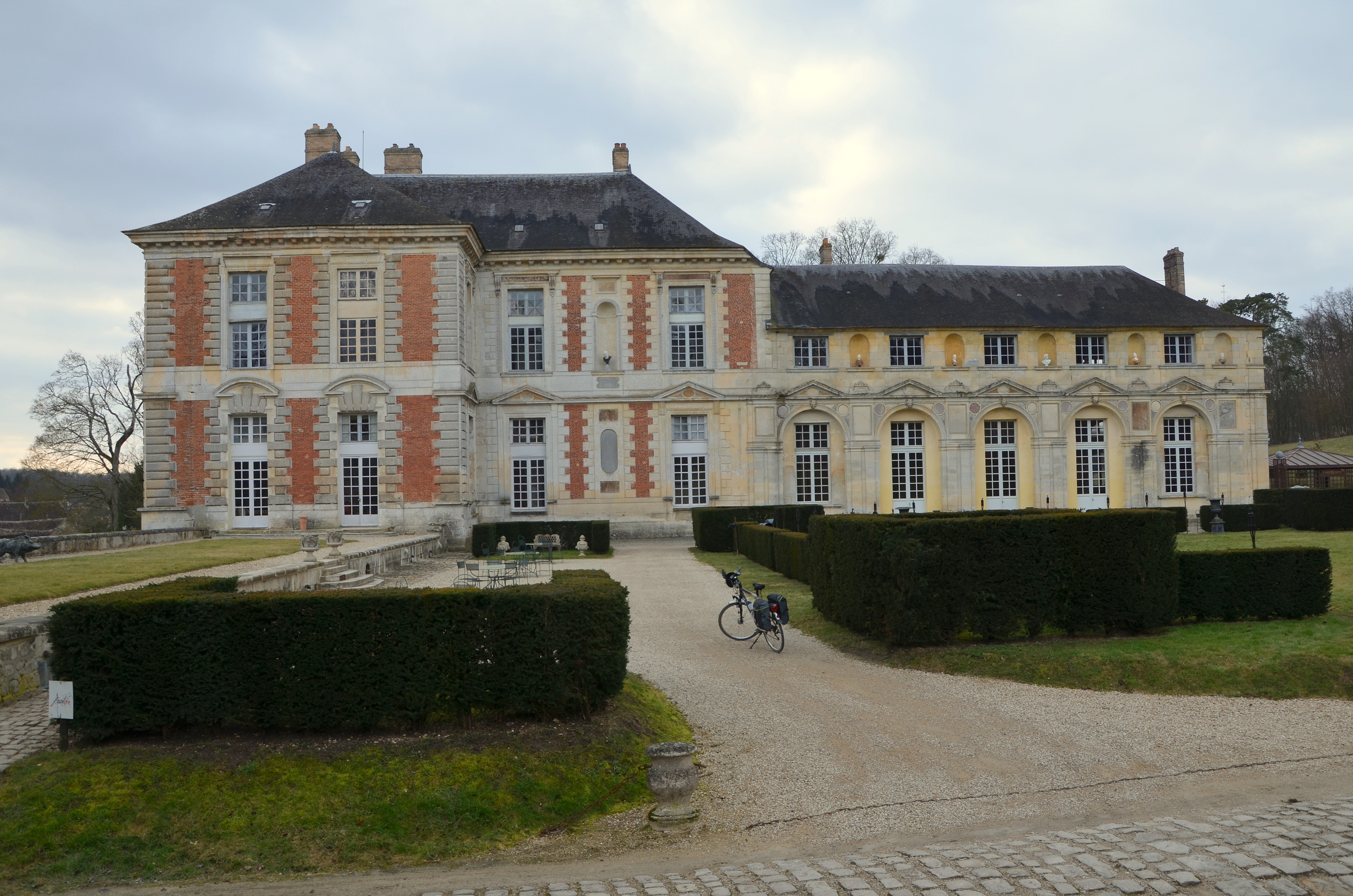 Chateau de Vallery, Yonne, France